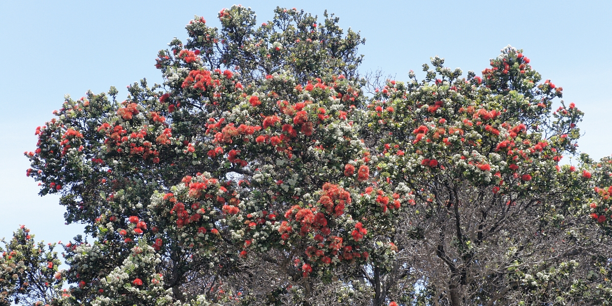 Иллюстрация Второва И.П. для учебника Гавайеведение.